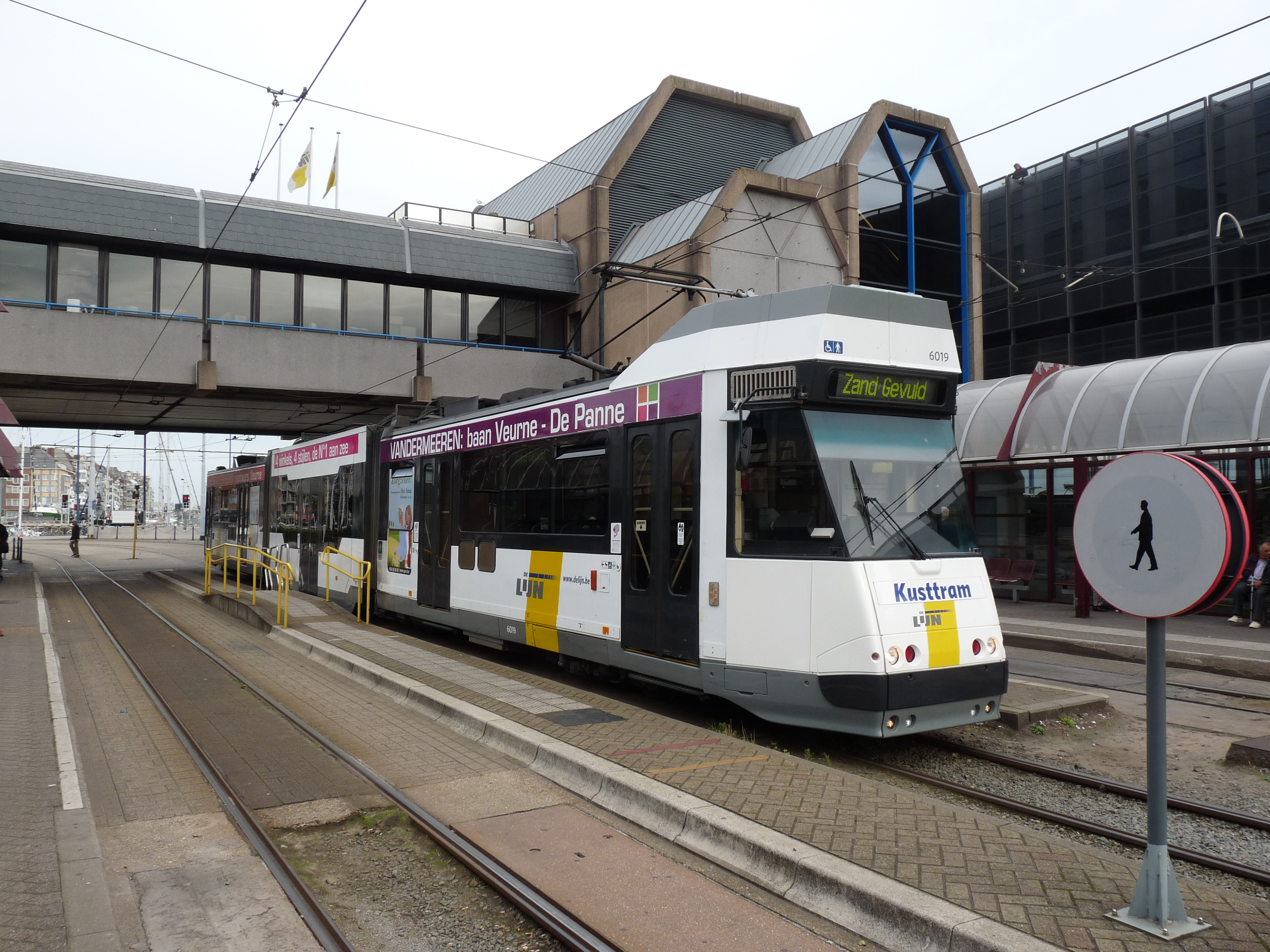 De tram bij het station van Ostende